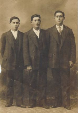 José Silva, en medio de sus hermanos.